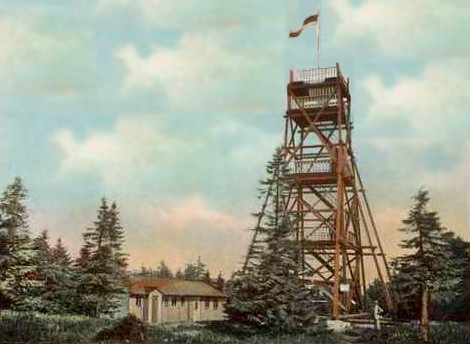 Isergebirge. Aussichtsturm auf der Tafelfichte.